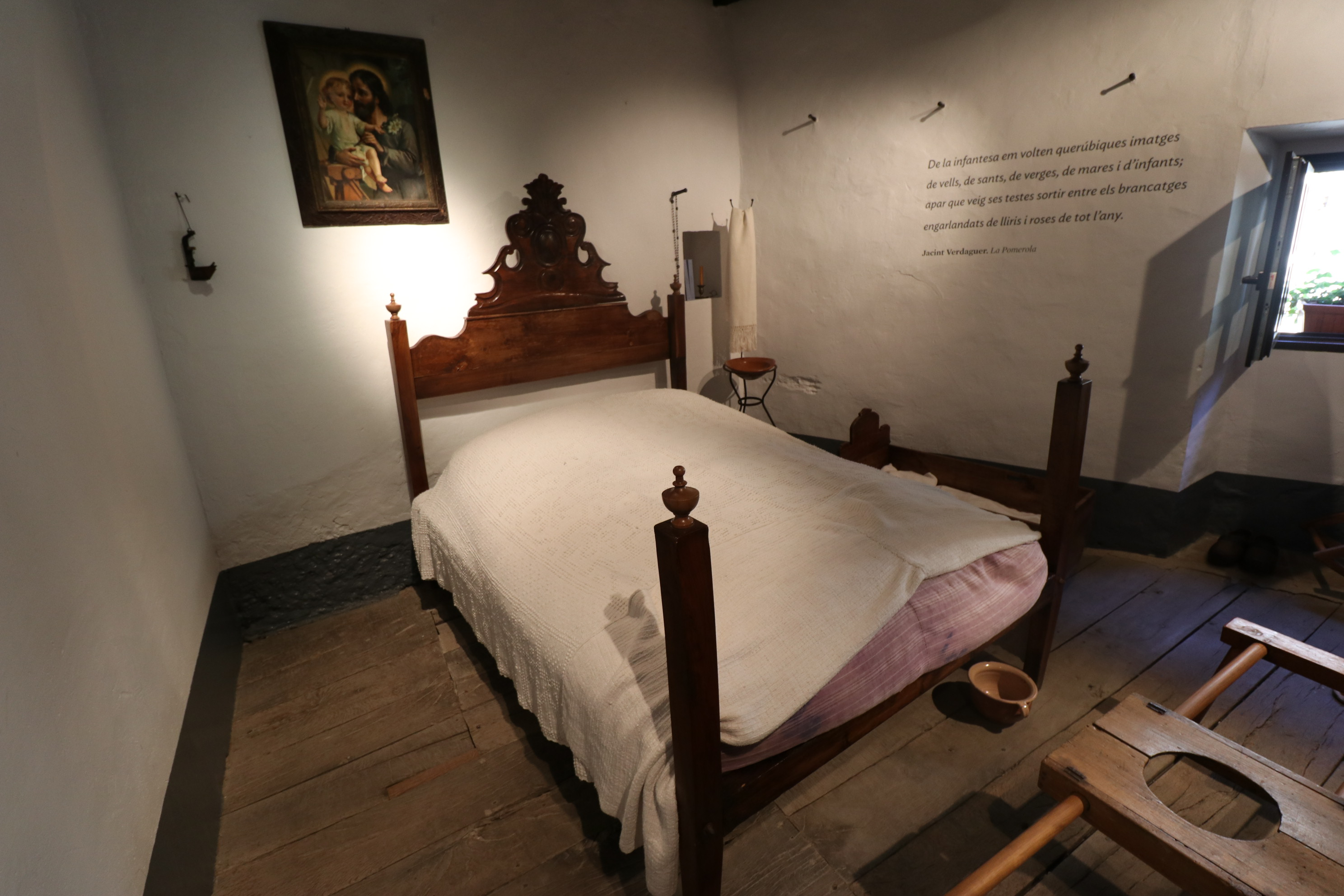 Llit de la casa Museu Verdaguer (Folgueroles)